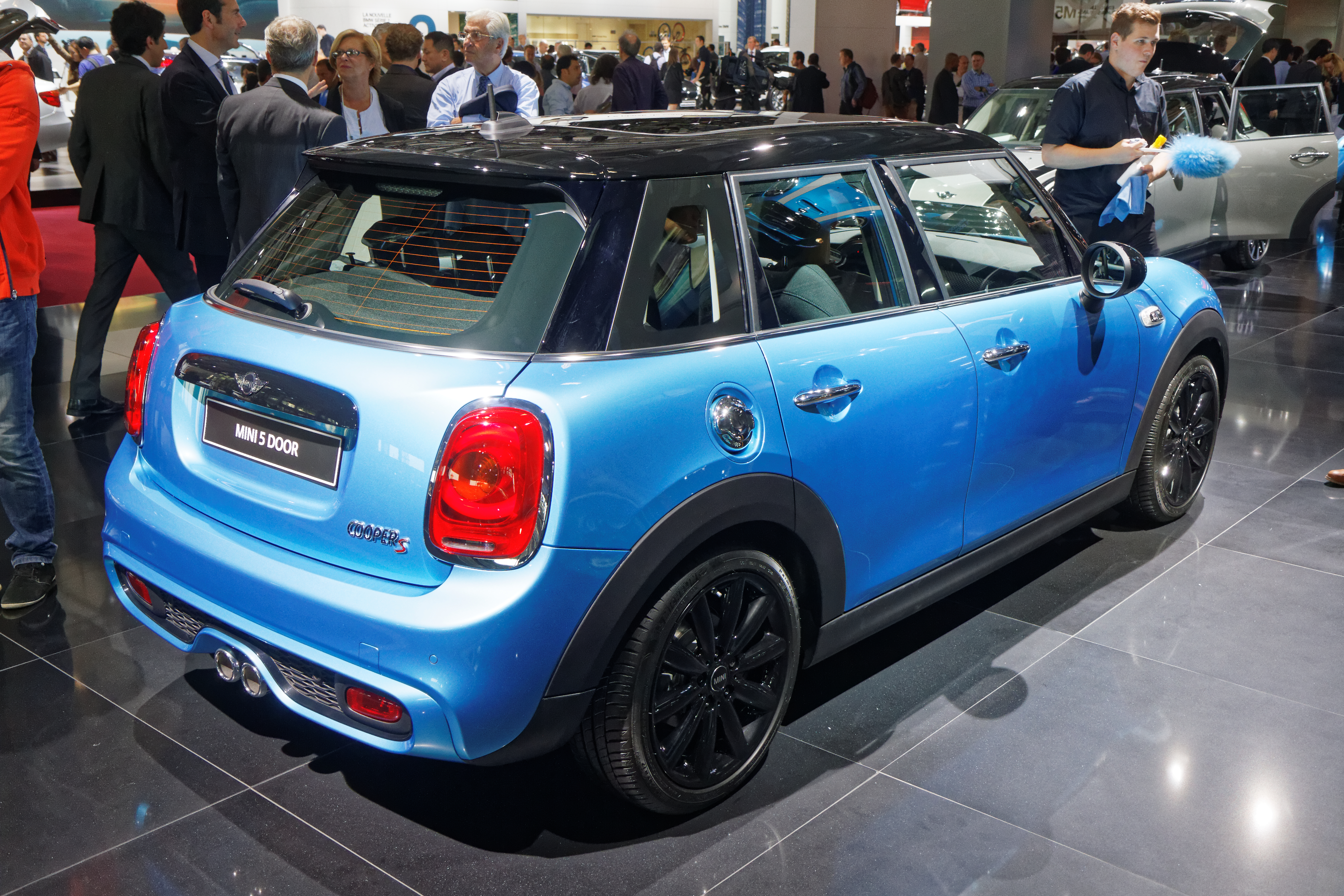 Une Mini 5 Door présentée lors du mondial de l'automobile de Paris 2014.